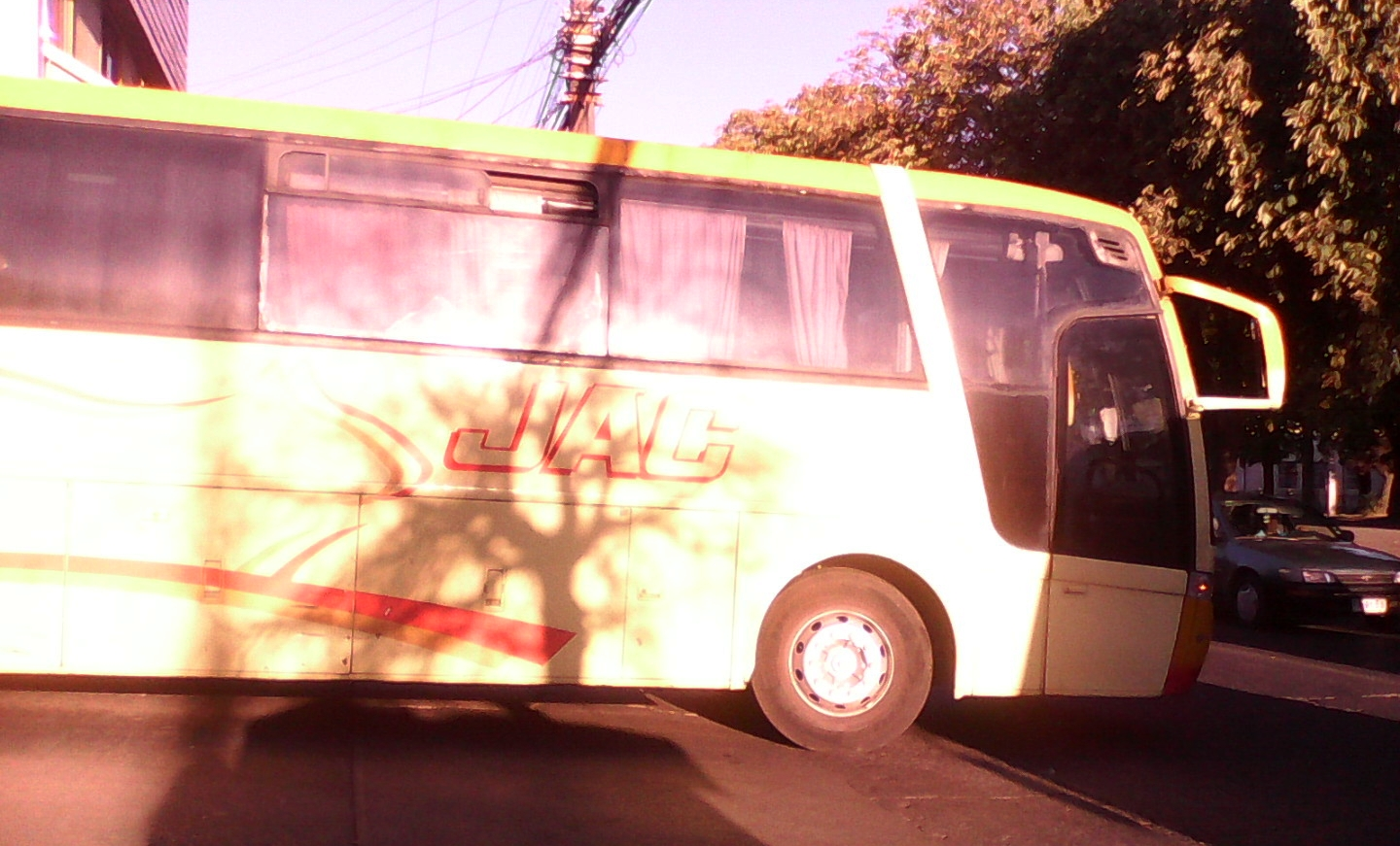 Bus JAC saliendo del terminal de la propia empresa en Temuco, Chile.